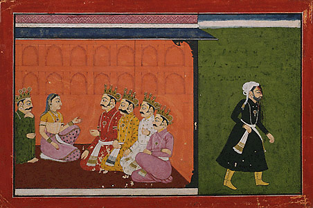 Draupadi and Ashvatthaman, Punjab Hills c. 1730